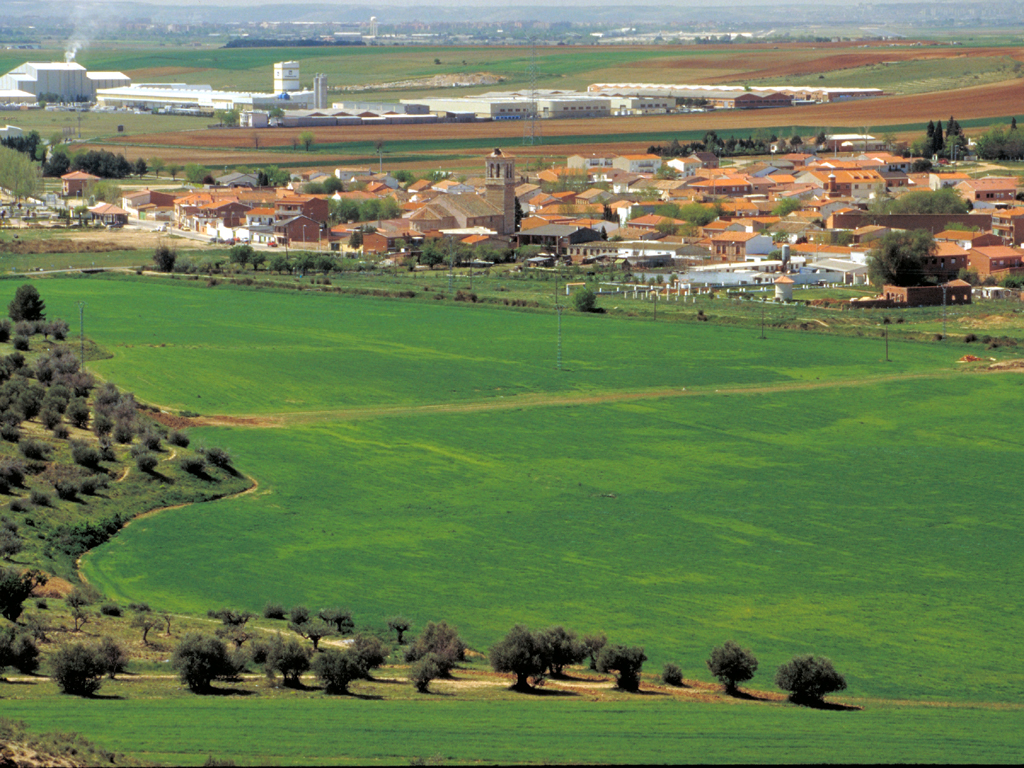 Paisaje de Camarma de Esteruelas en primavera.